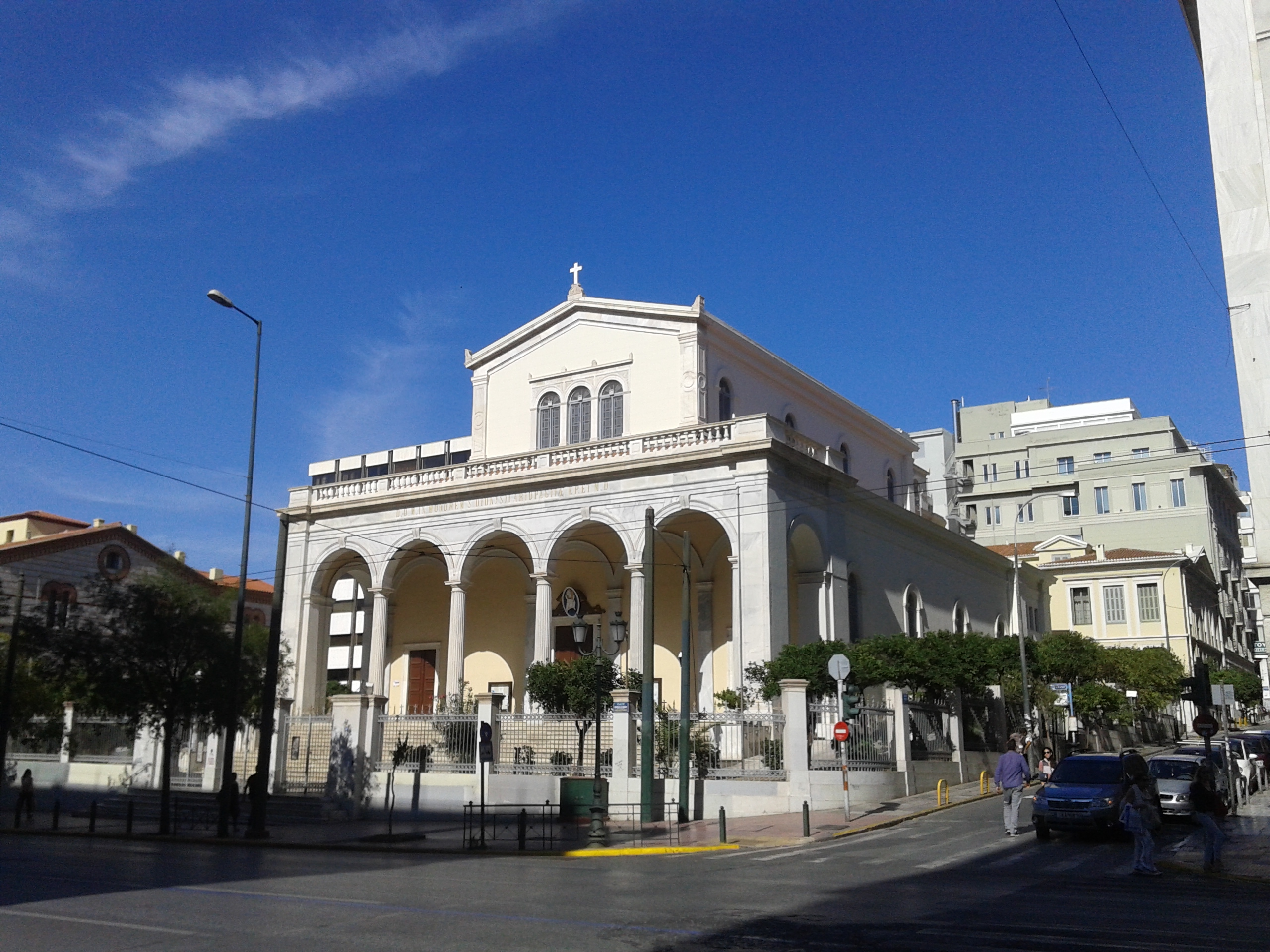 Καθολικός Ναός Αγίου Διονυσίου«Καθολικός Ναός Αγίου Διονυσίου»